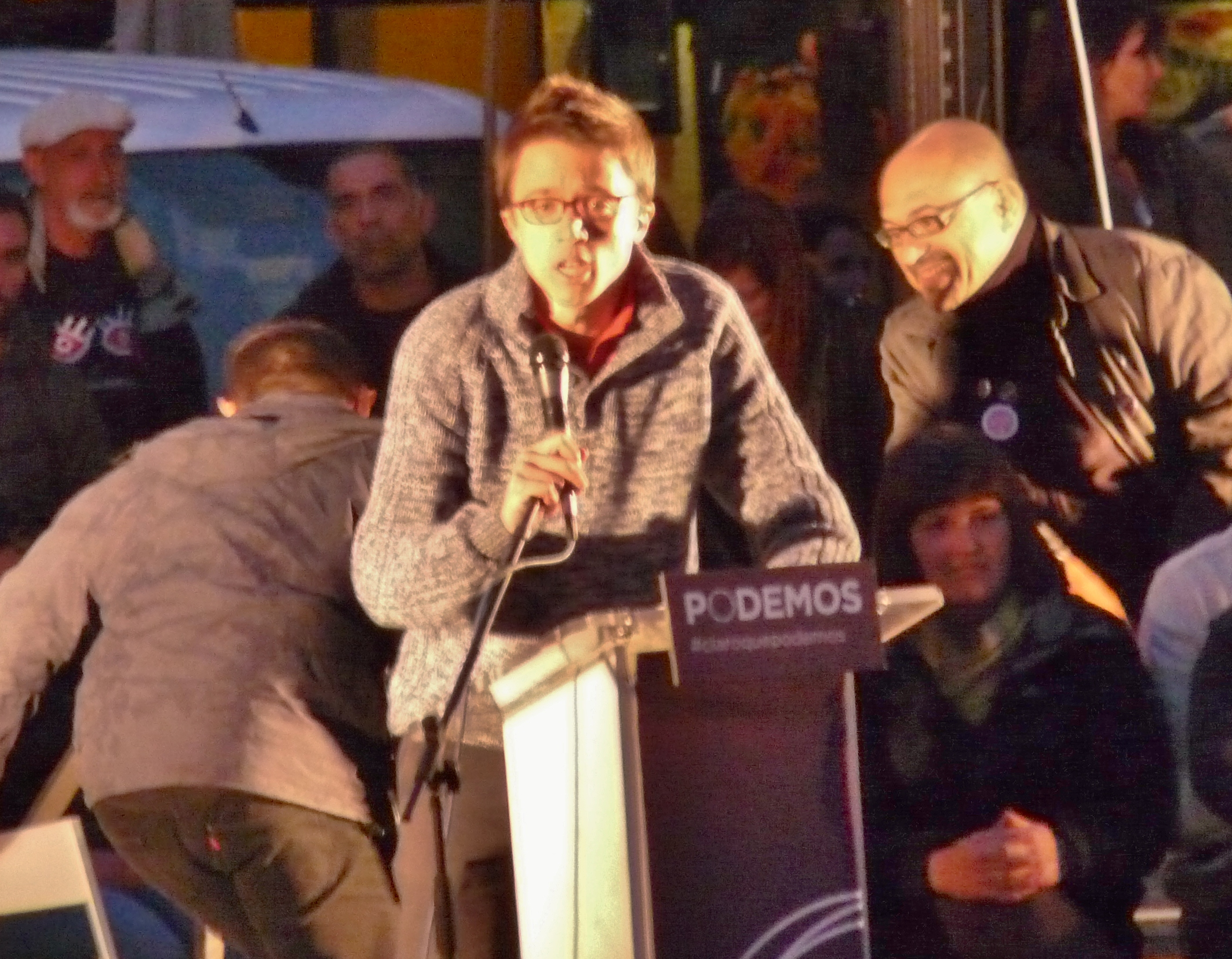 Íñigo Errejón en el mitín de fin de campaña de las elecciones europeas de 2014 celebrado el 23 de mayo en Madrid.